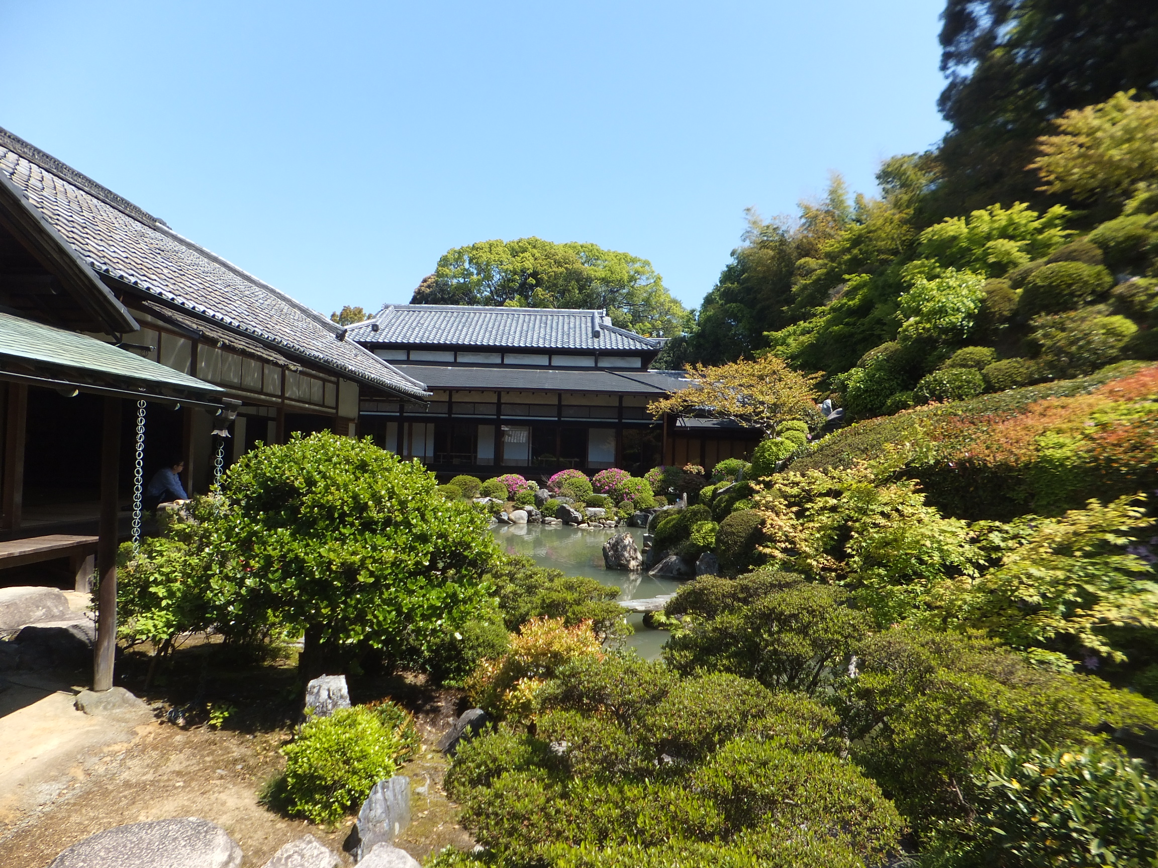 智積院(2013年5月3日)